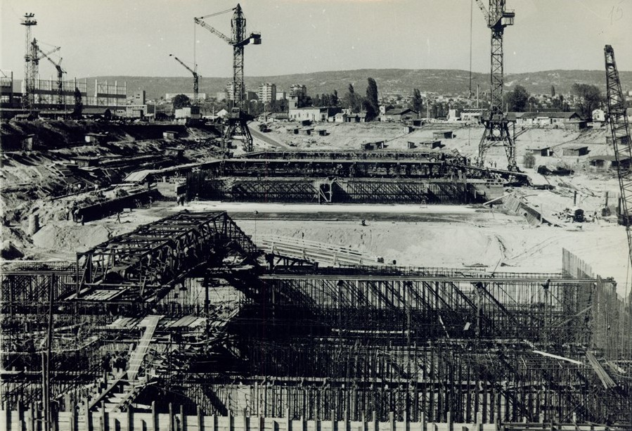 Етап от реконструкцията на корабостроителен завод "Георги Димитров" – Варна.